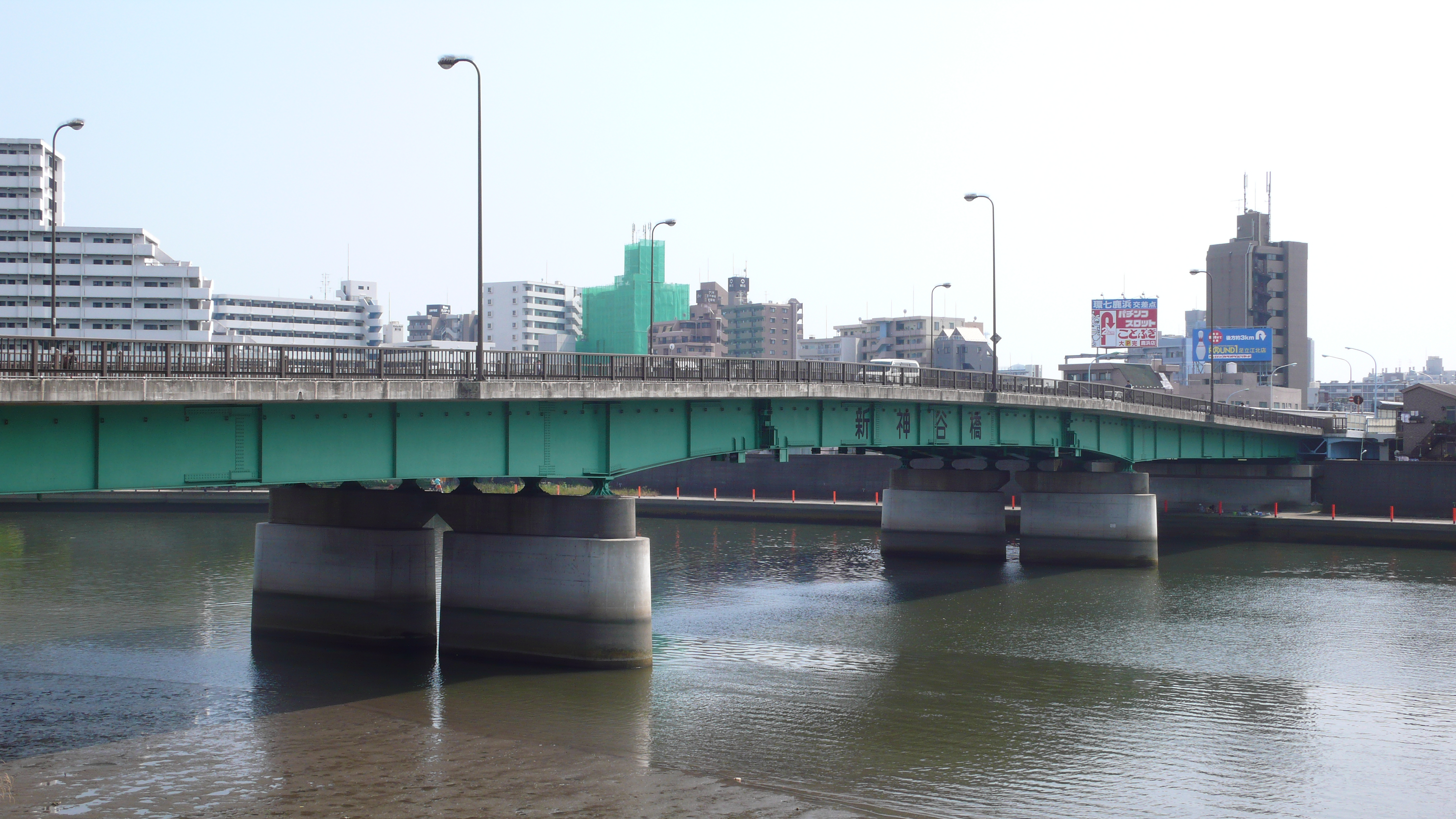 隅田川に架かる新神谷橋を東京都足立区から撮影